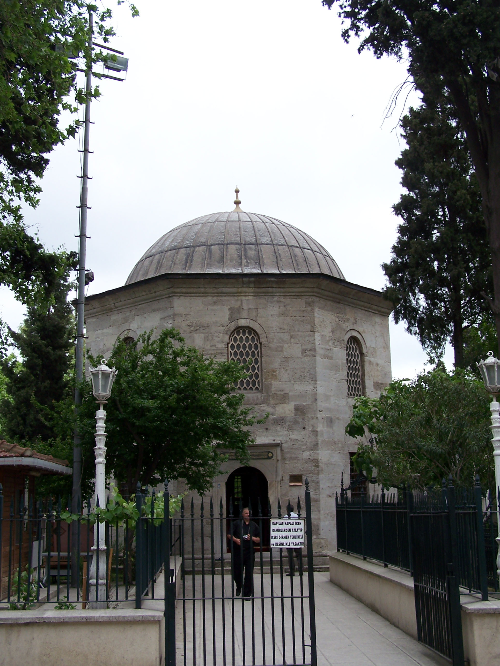 Gülbahar Hatun Türbesi at Fatih Camii in Fatih, İstanbul, Turkey